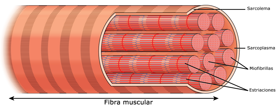 Esquema en el que se repreenta una fibra muscular de músculo estriado